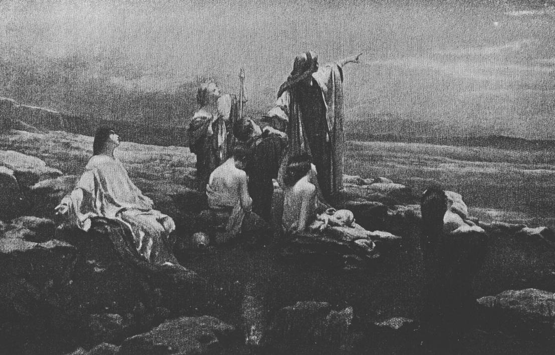 Ilustrace z Anglické Bible /1867/ z knihy Malachiáš ze Starého zákona.